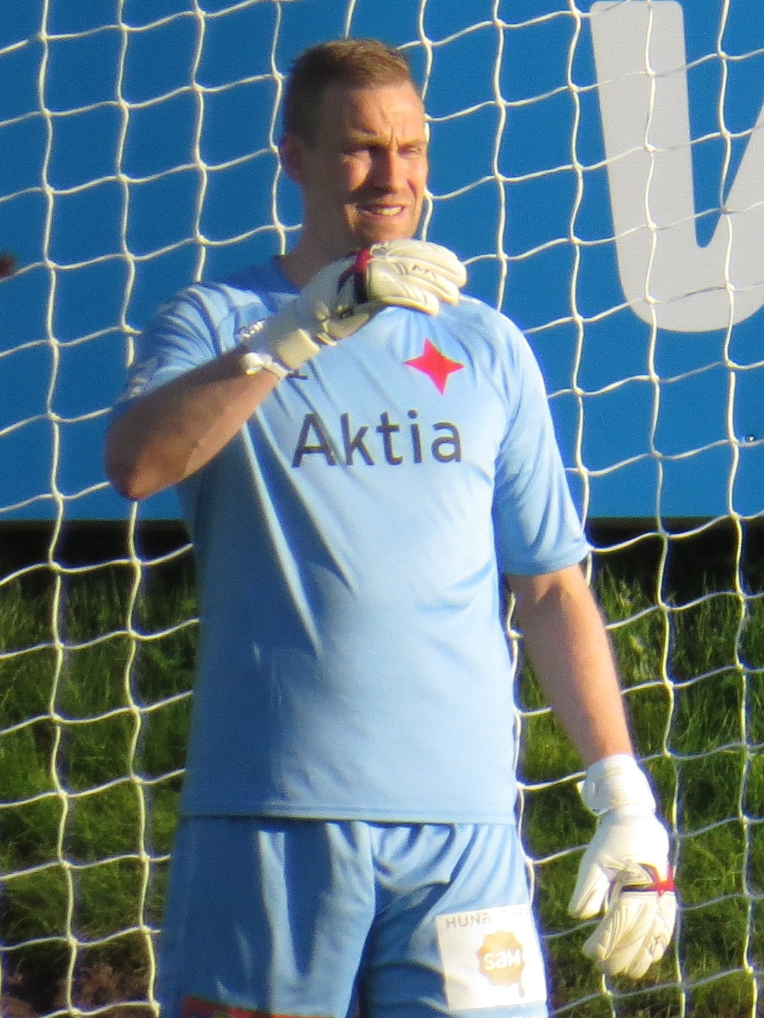 Mika Johansson, suomalainen jalkapallomaalivahti HIFK:n joukkueessa kaudella 2015.